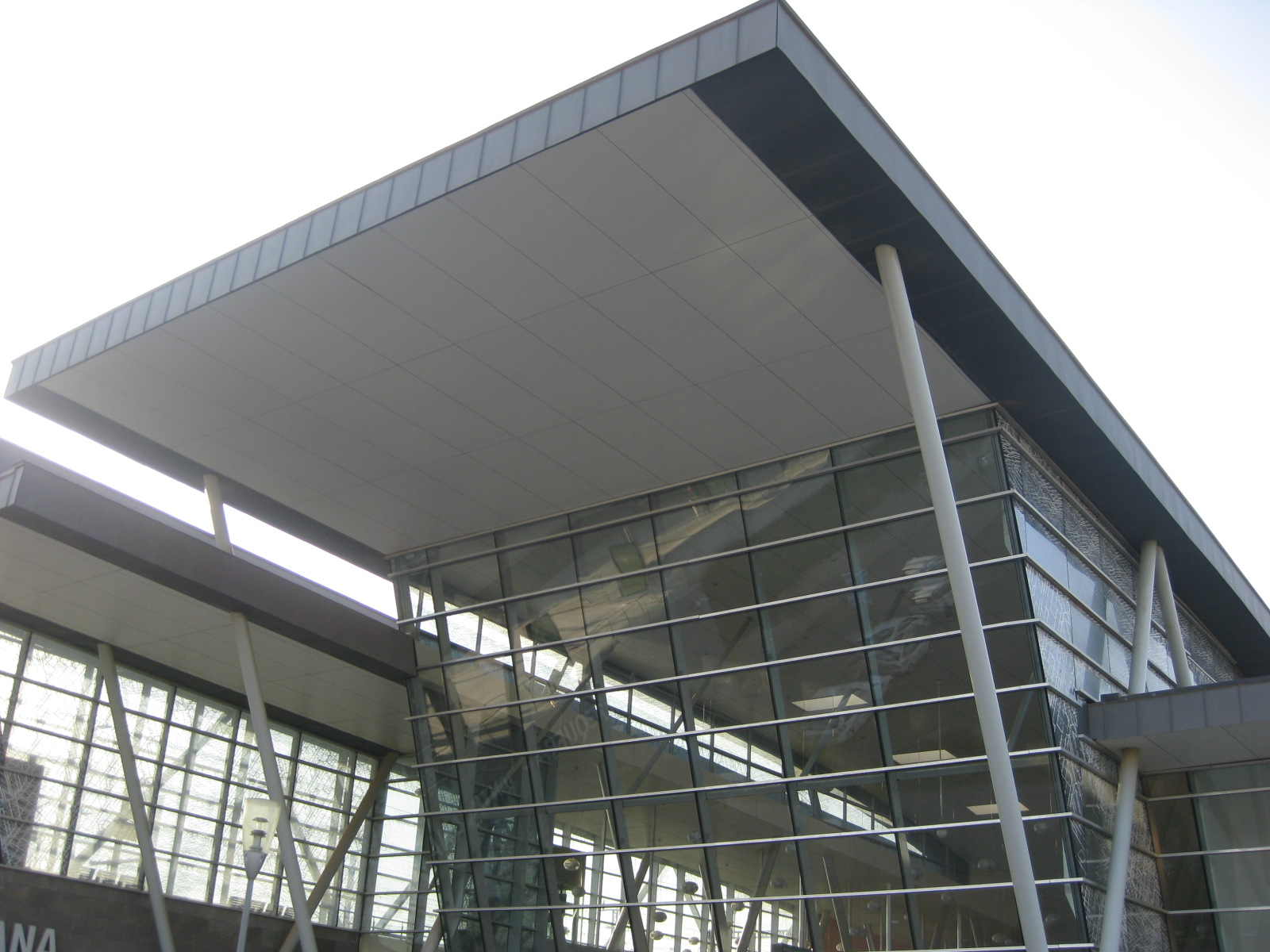 Estación AVE Santa Ana